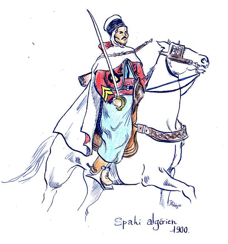 dessin personnel de Jp.negre